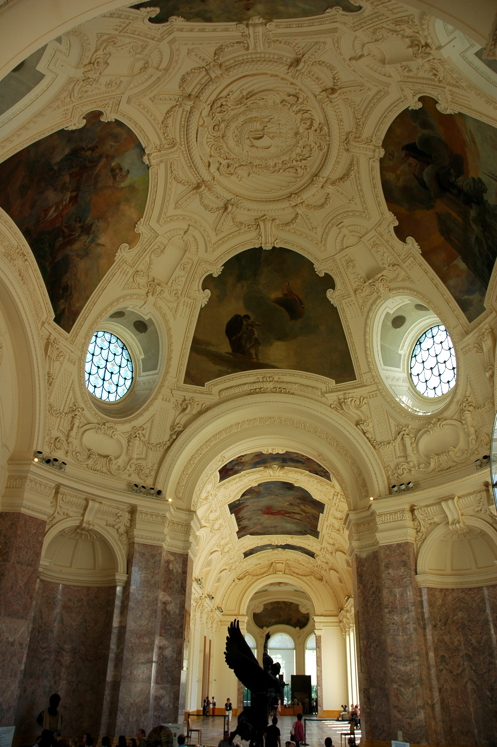 France Paris Petit Palais La coupole de l'entrée vue depuis l'aile gauche en 2006 Photographie prise par GIRAUD Patrick